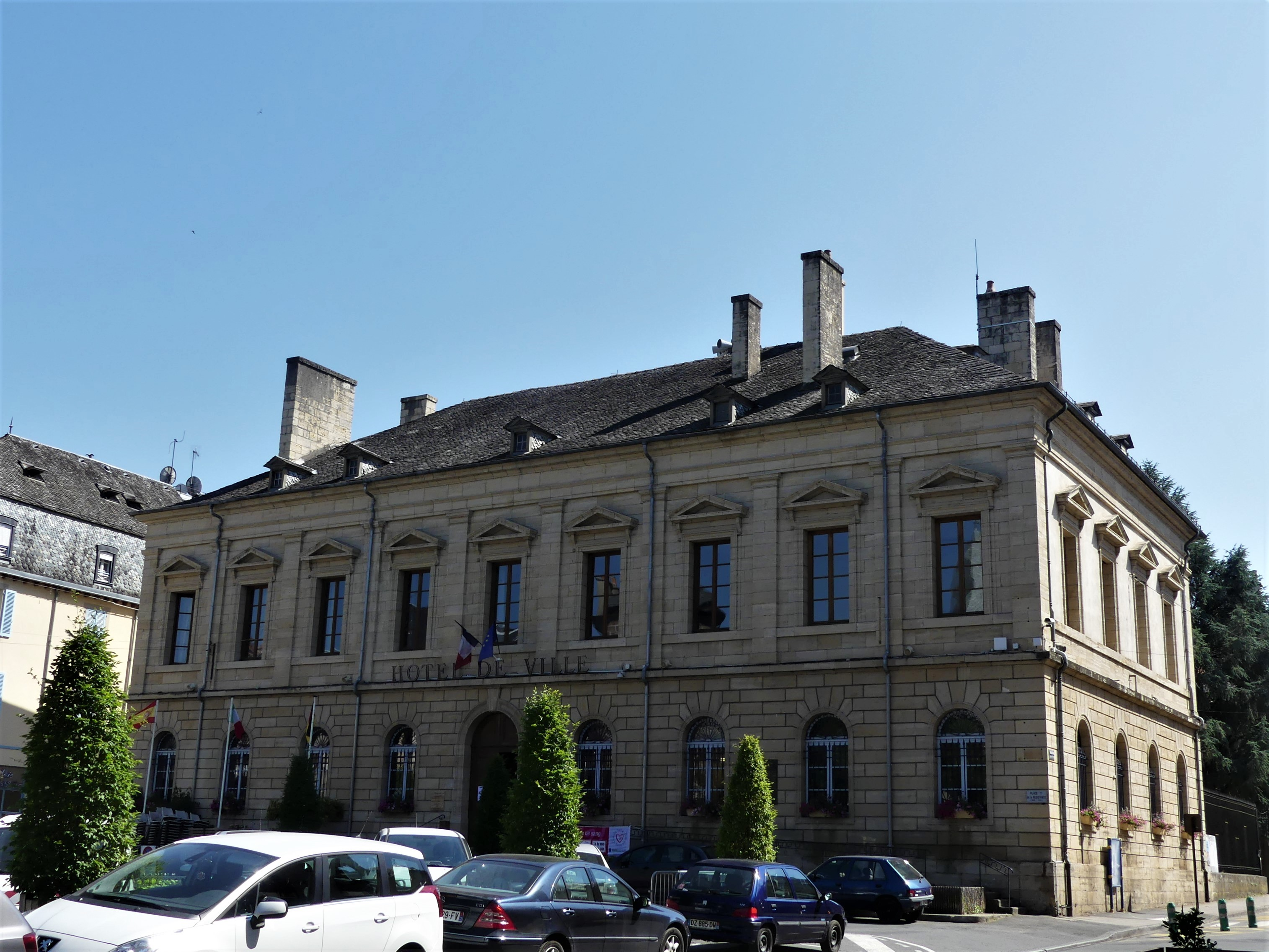 La façade nord de l'hôtel de ville, Espalion, Aveyron, France.